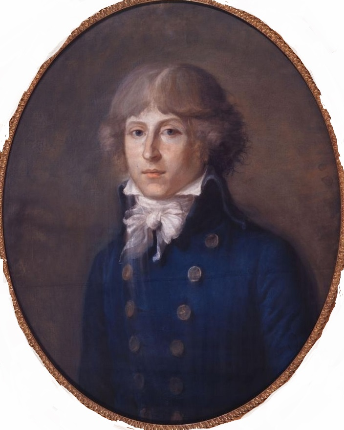 Portrait présumé de Louis-Antoine de Saint-Just.